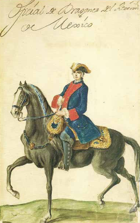 Korabeli Guillermo Dupaix ábrázolás (18. század)